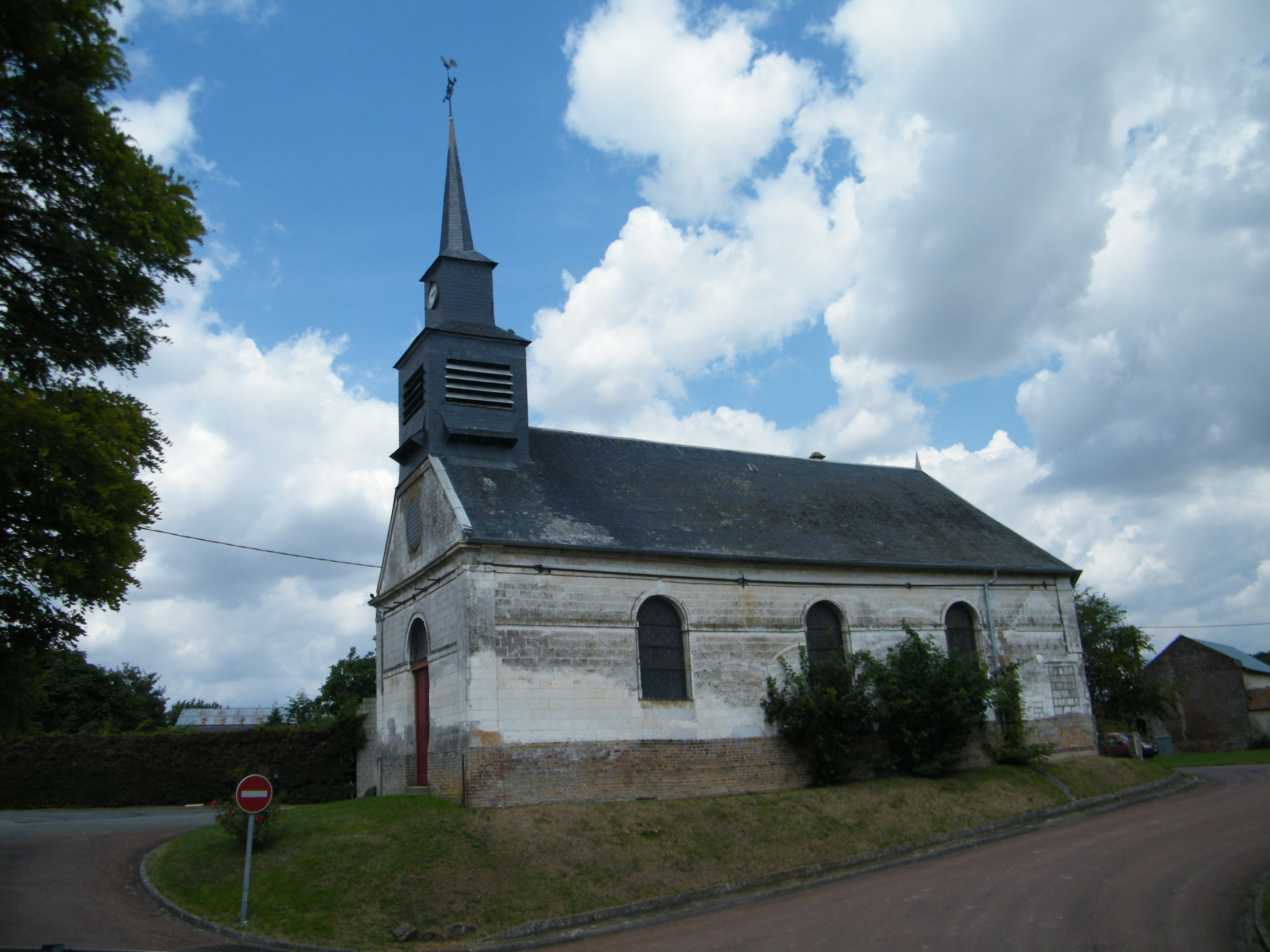 église.